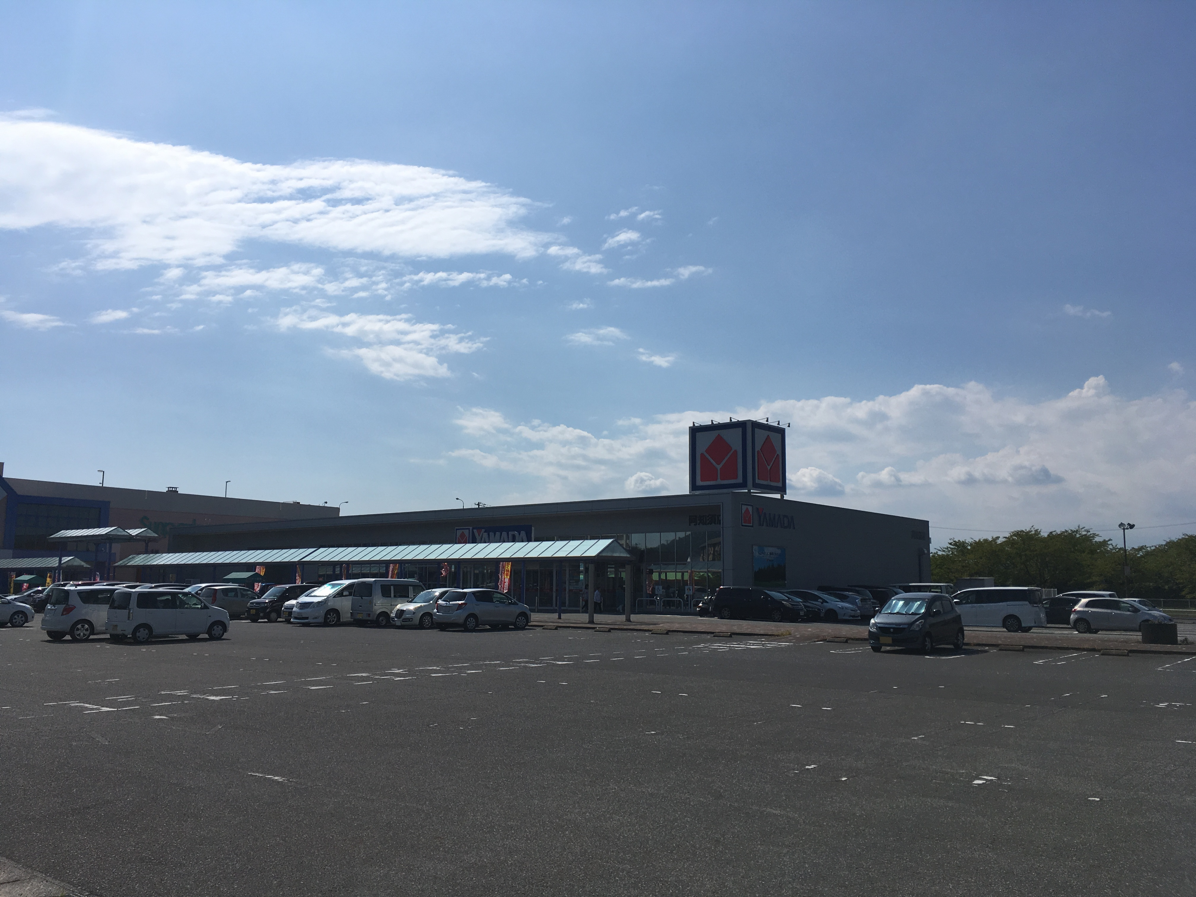 ヤマダ電機 テックランド 阿知須店